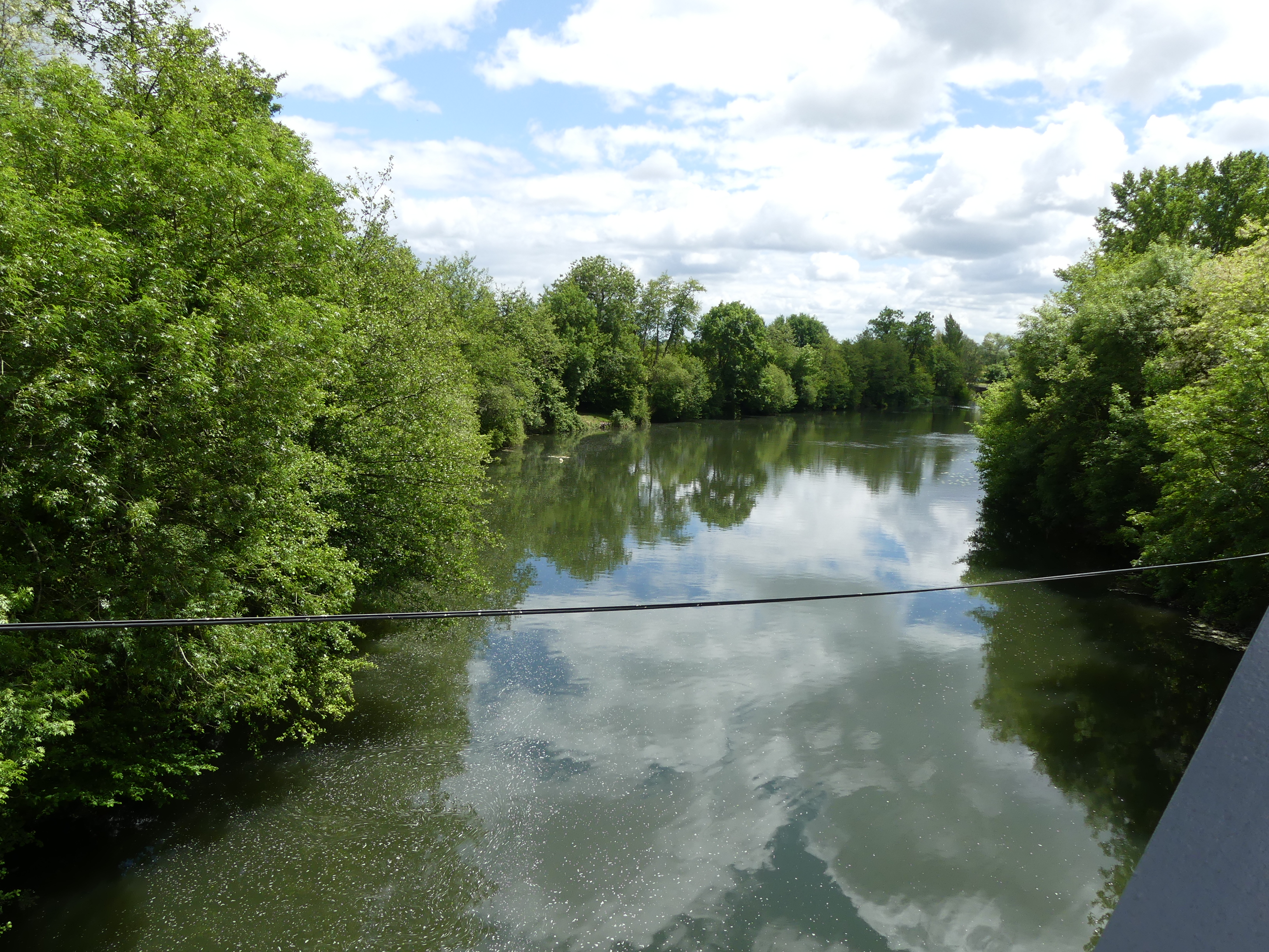 L'Isle en amont du pont de la route départementale 121, entre Saint-Antoine-sur-l'Isle (Gironde, à gauche) et Moulin-Neuf (Dordogne, à droite), France.